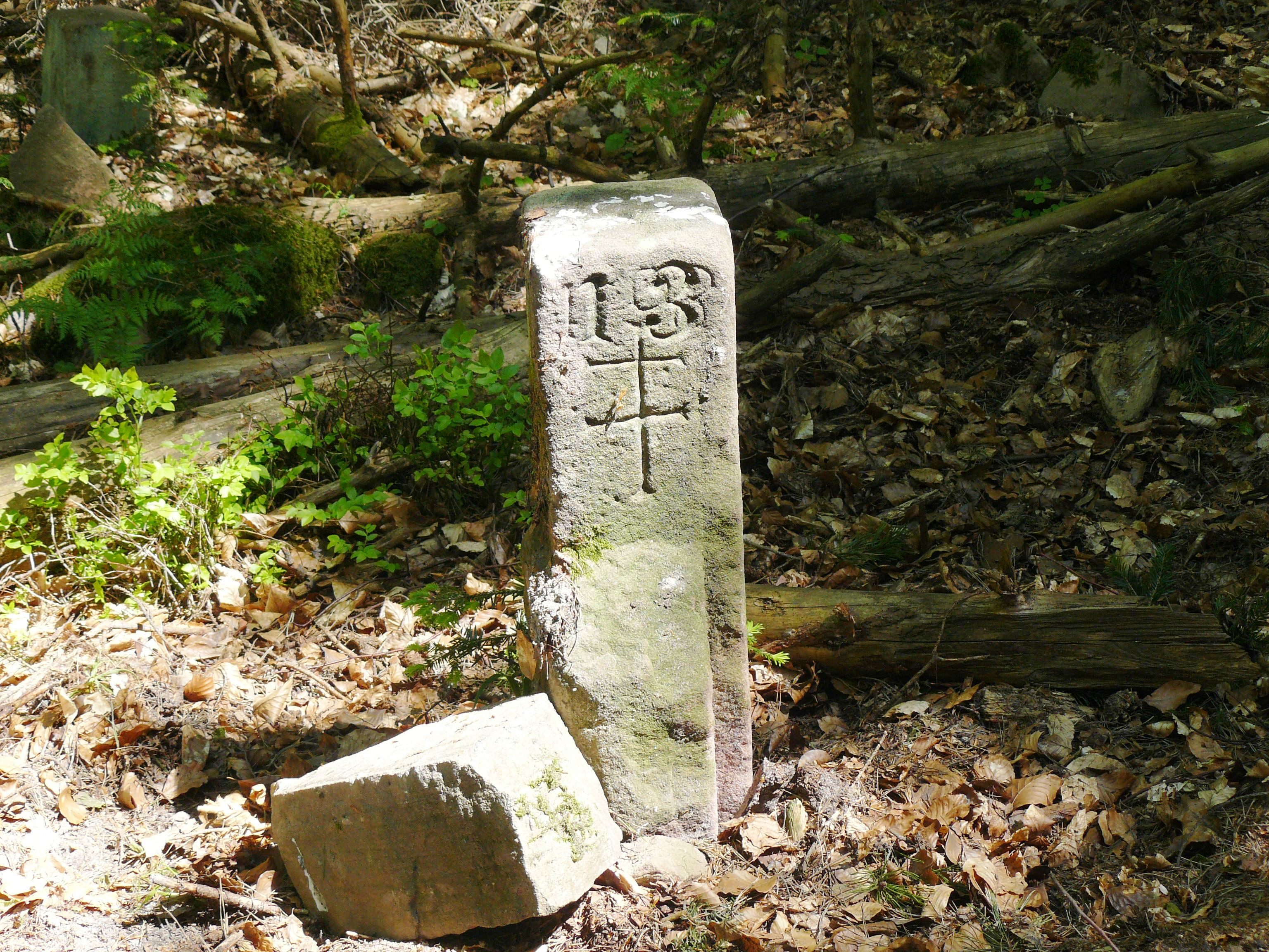 Ancienne borne frontalière installée en 1780 séparant le Comte-Ban et le Duché de Lorraine entre les bancs de Breitenau et Rombach-le-Franc